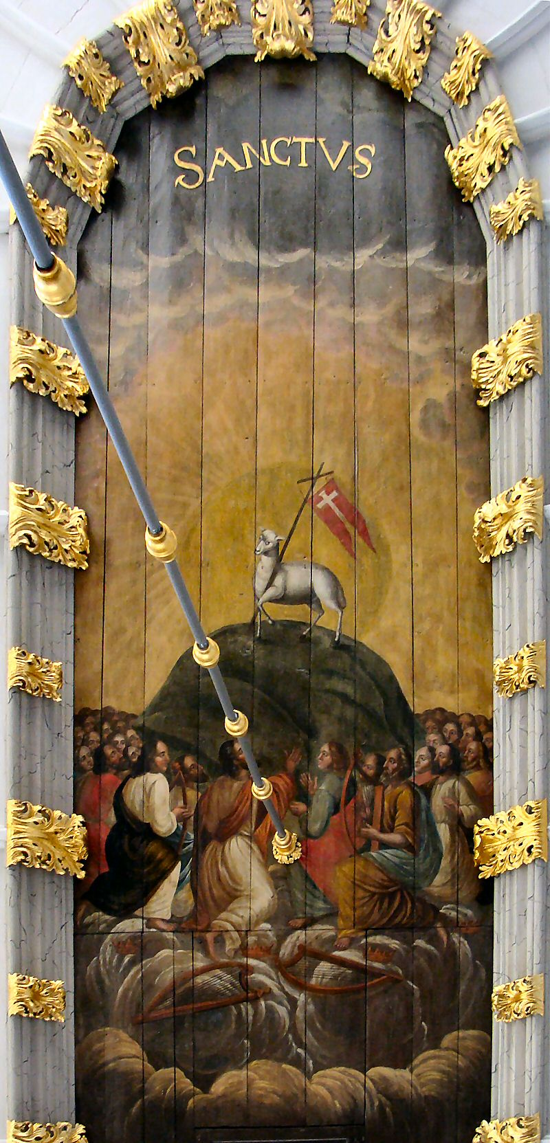 Szczecin - kościół św. Piotra i Pawła